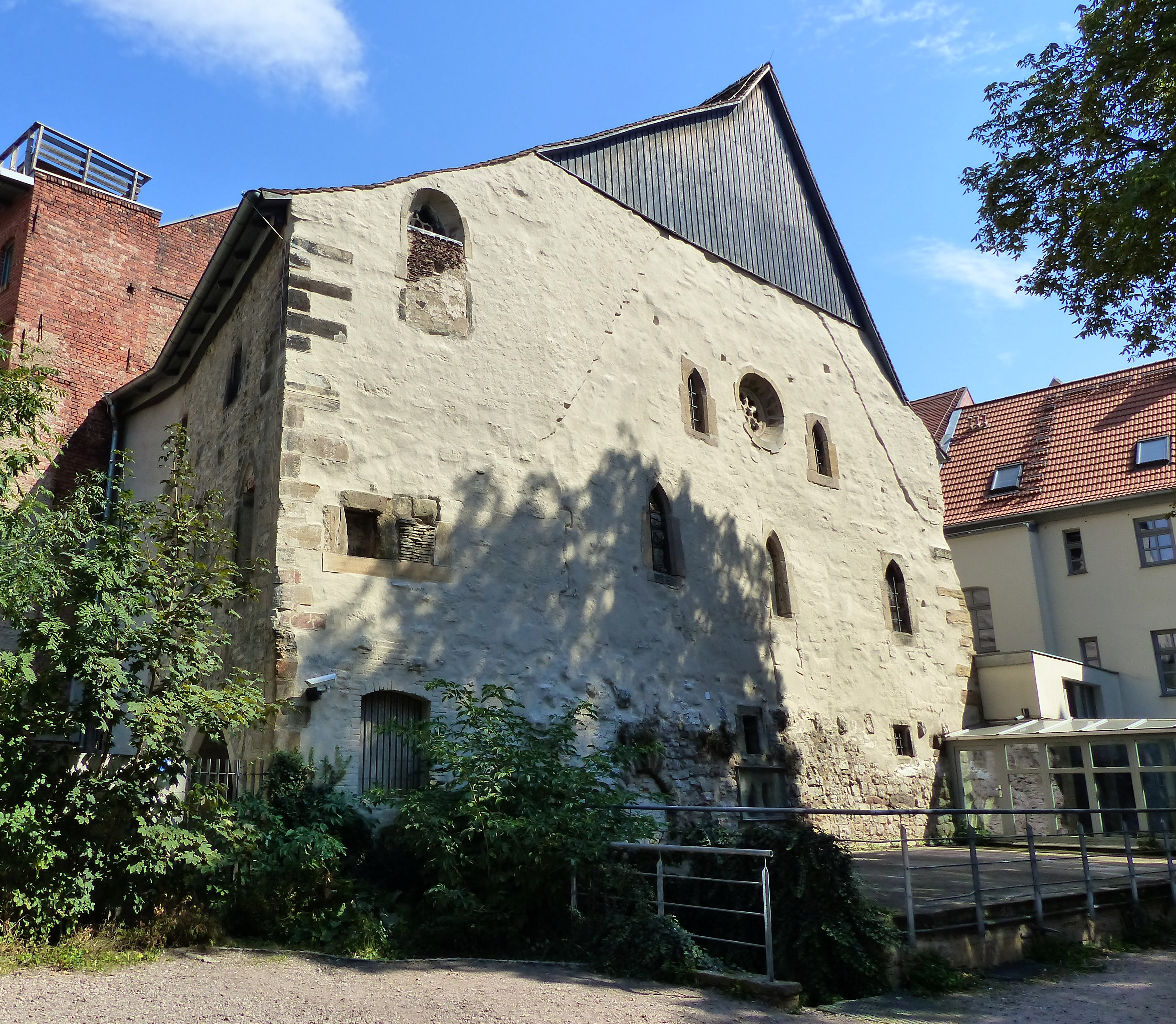 Alte Synagoge, Waagegasse 8, Erfurt